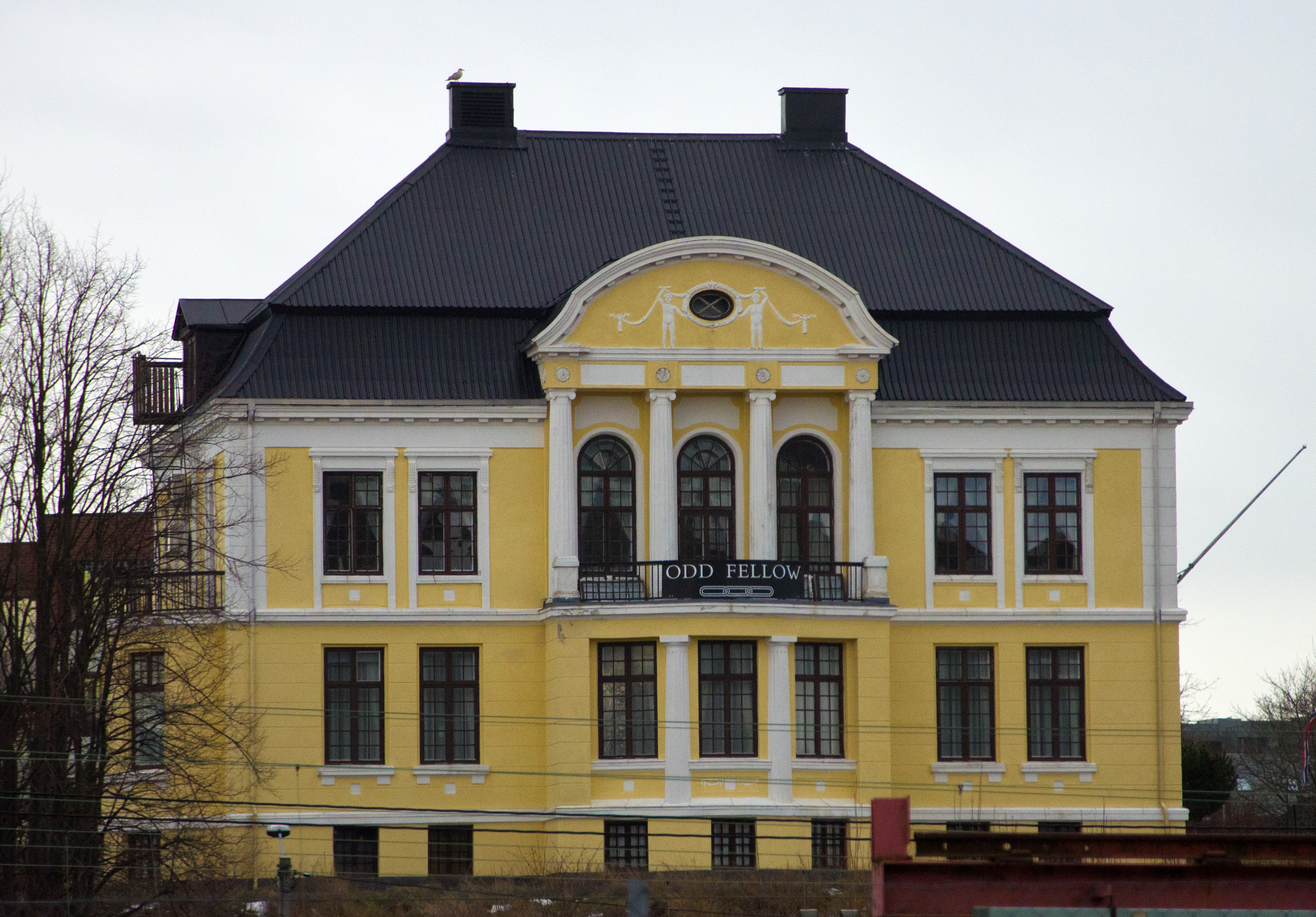 Falckenbergs gate 7 (Odd Fellow-bygget) reist 1916-17. Arkitekt Ole Andreas Sverre.